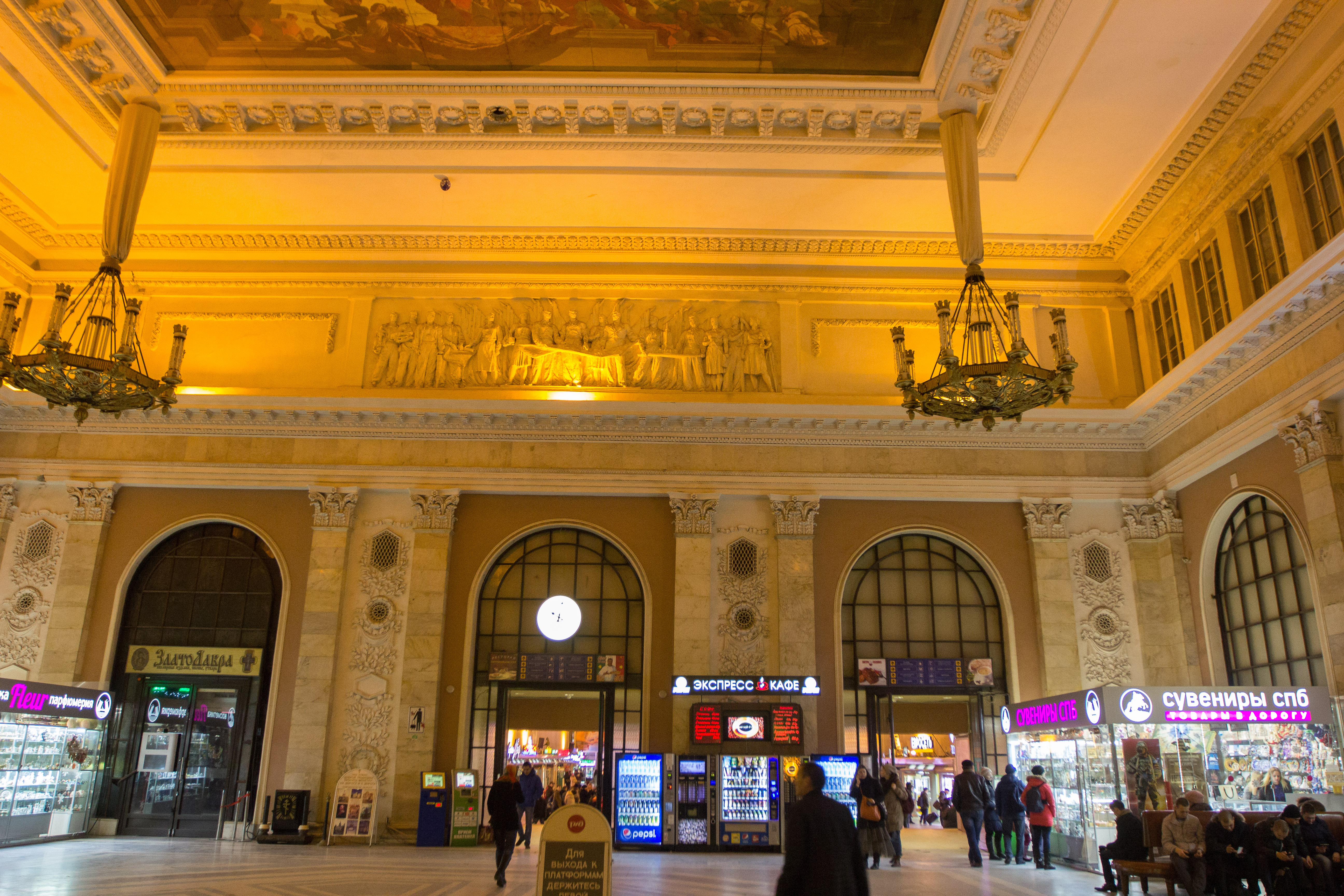 Vue du hall de la gare de Moscou à Saint-Pétersbourg (Russie)